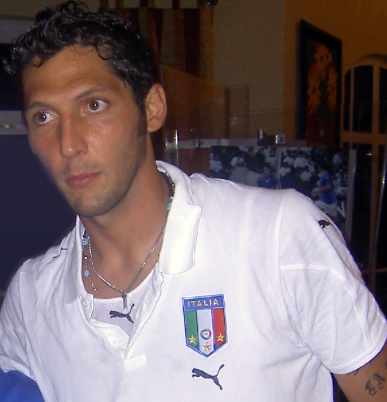 Marco Materazzi, Italian football/soccer player. Immagine ritagliata da Immagine:Urby2004 e Marco Materazzi.jpg